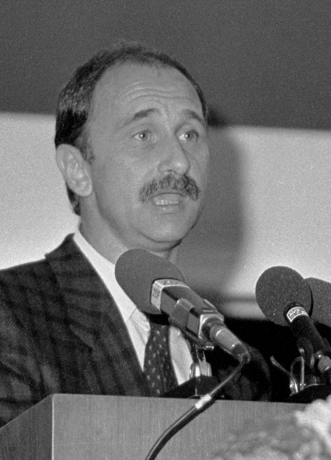 Ulrich Bienzle (* 1939, † 2008), deutscher Tropenmediziner und Direktor des Berliner Tropeninstituts. Aufnahme vom 6. November 1986, Berlin, Rede auf der AIDS-Tagung